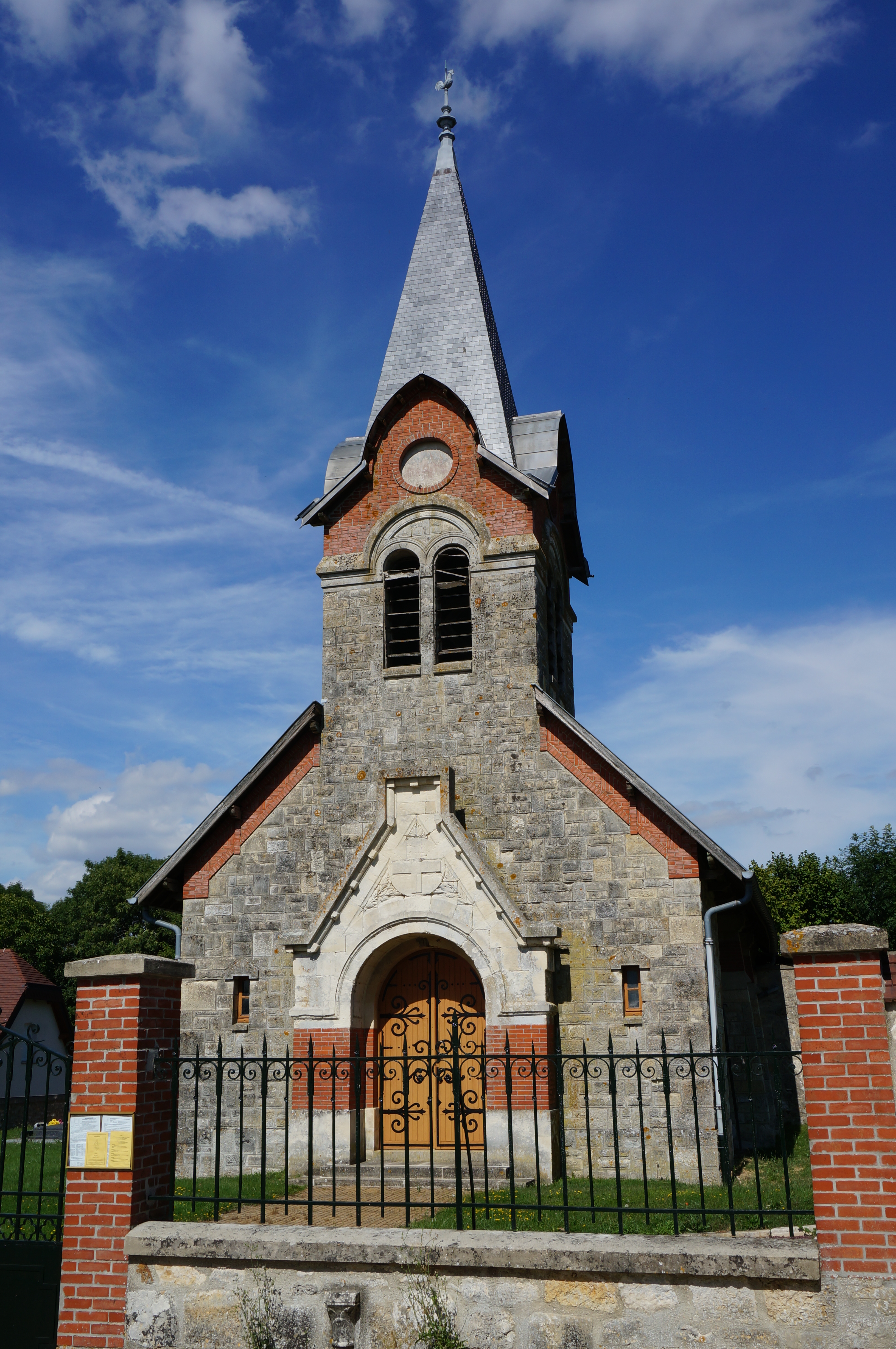 L'église et son cimetière.